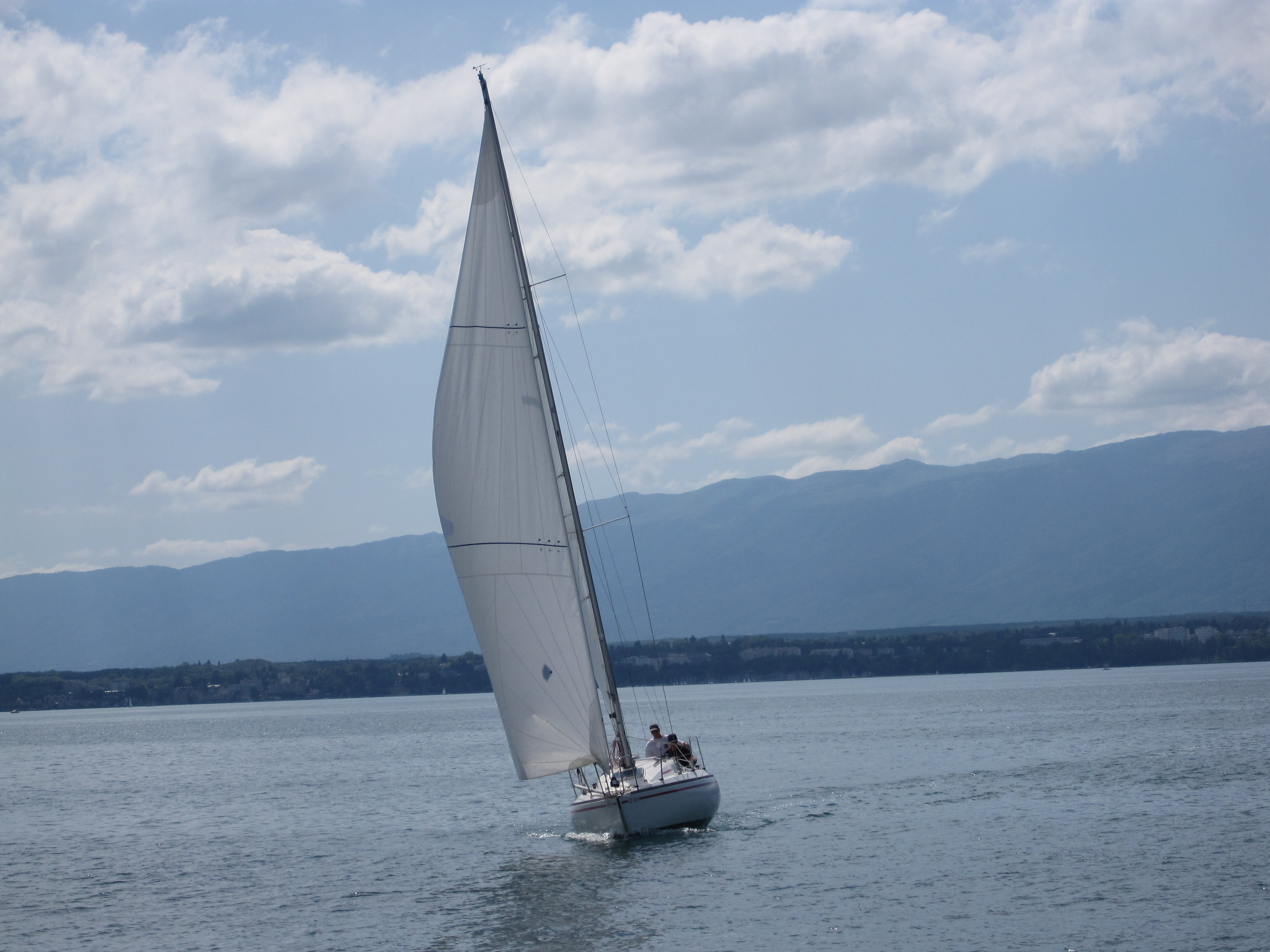 Delph 28, Hermance, Lac Léman